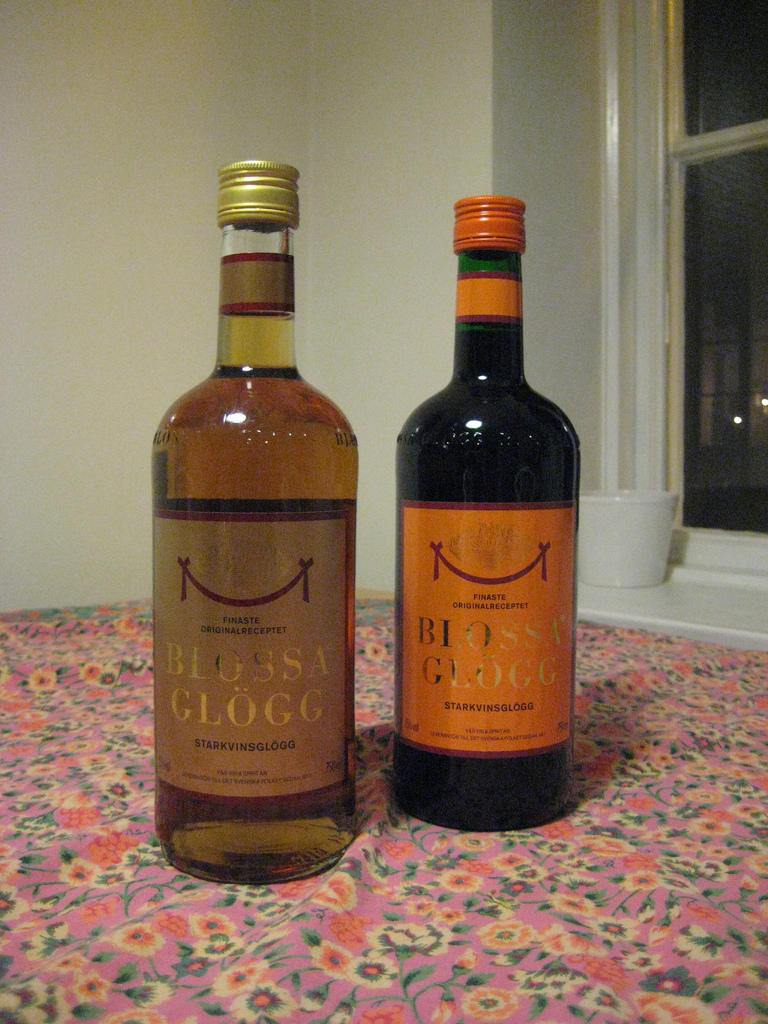 Bouteilles pour préparer un vin chaud en Suède lors de la période de Noël